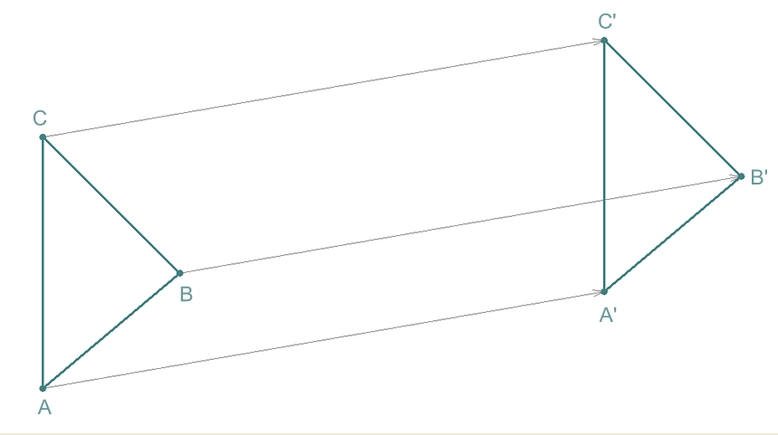 Traslación, Traslación de un Triángulo, isometría, transformaciones isométricas, geometry